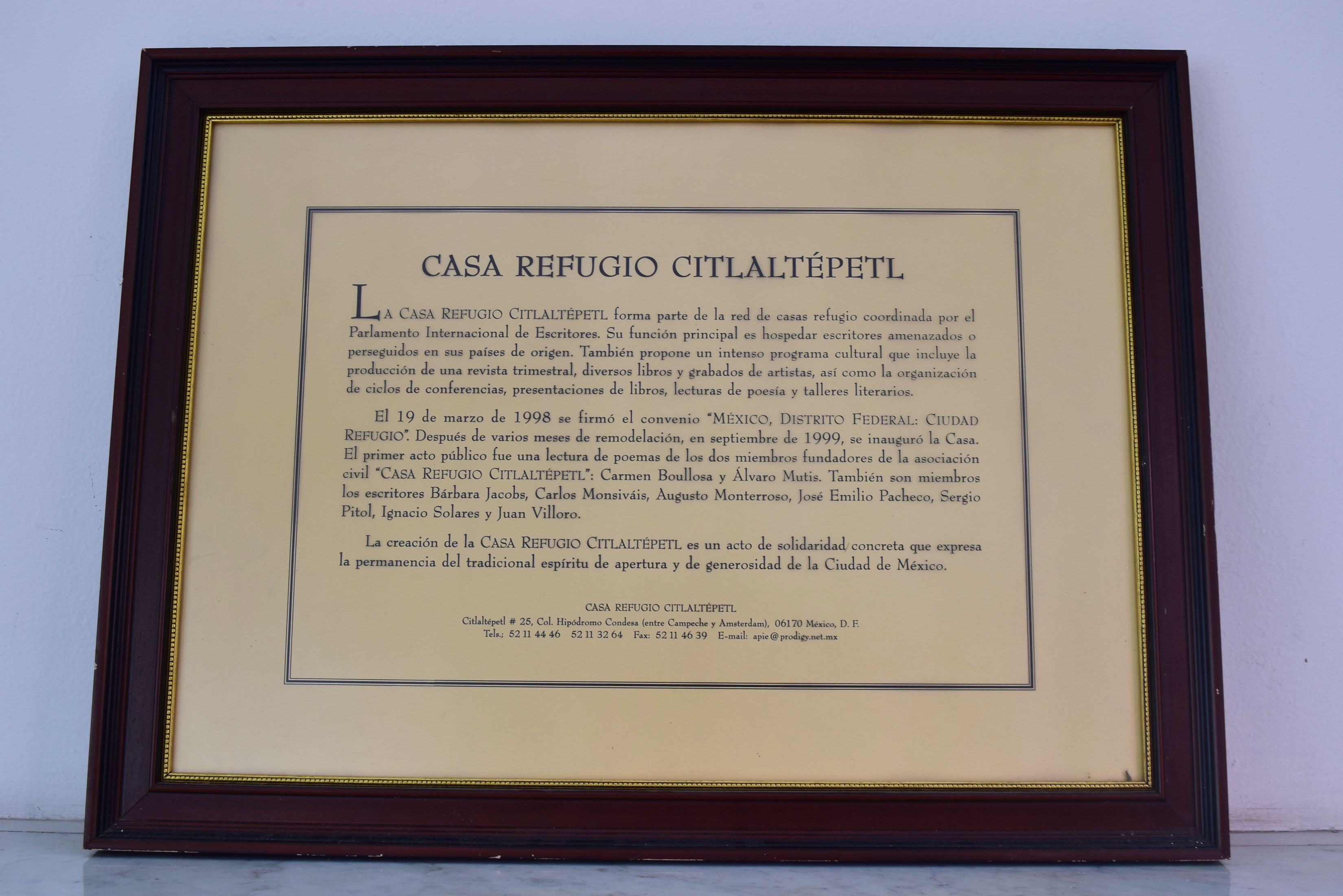 Sábado 21 de abril de 2018 En la Casa Refugio Citlaltépetl se realizó el OPEN HOUSE CDMX, como parte de Open House Worldwidered, organismo de ciudades que trabajan con el fin de fomentar el aprecio por la arquitectura local. Fotografía: José Luís Rodríguez / Secretaría de Cultura CDMX